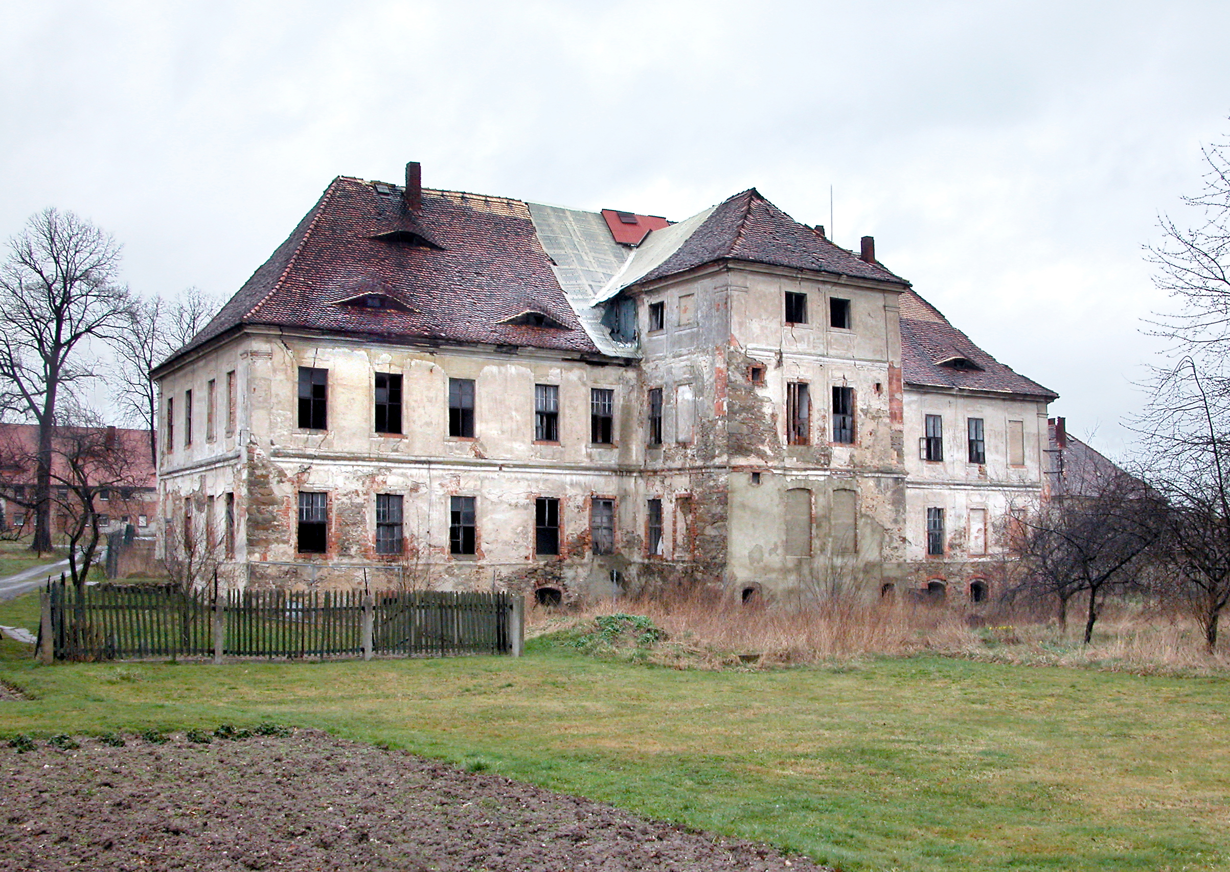 16.03.2008 02699 Jeßnitz (Puschwitz), Jeßnitz 1: Rittergut, Herrenhaus (GMP: 51.249368,14.270206), Landseite. Eines der schönsten Barockschlösser der Oberlausitz verfällt. Das fast vierzig Meter lange Herrenhaus wurde 1717 für Adam Gottlob von Pentzig erbaut. Der letzte Besitzer vor 1945 war der Fabrikant Alfons Porak. Heute hat das Bauwerk hat so bedenkliche Risse, dass mit einem Einsturz zu rechnen ist. [DSCN31916.TIF]20080316160DR.JPG(c)Blobelt